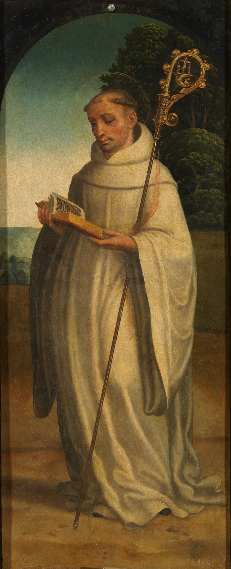 La obra representa a San Bernardo de Claraval, canonizado por la Iglesia Católica en 1174 y proclamado Doctor de la Iglesia en 1830.